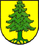 Wappen von Tann (Rhön)“Das Wappen zeigt in Gold eine bewurzelte grüne Tanne”